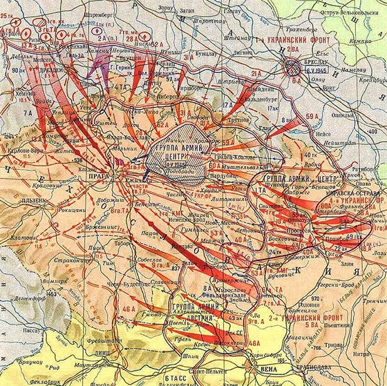 PO